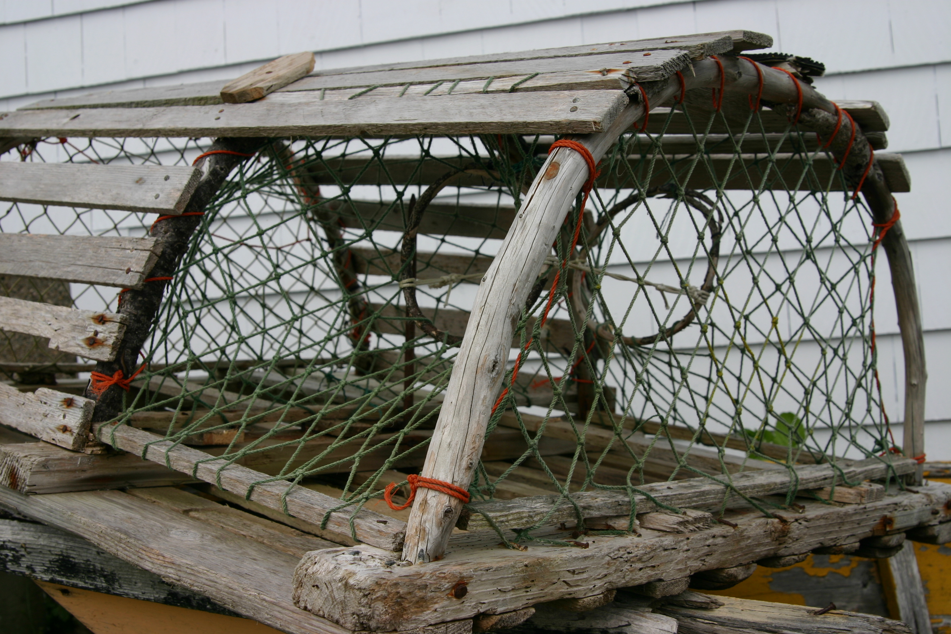 Antique Lobster Trap